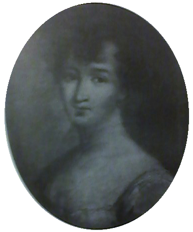 Елизавета Семеновна Нащокина, ур. Хвостова (1771—1810)